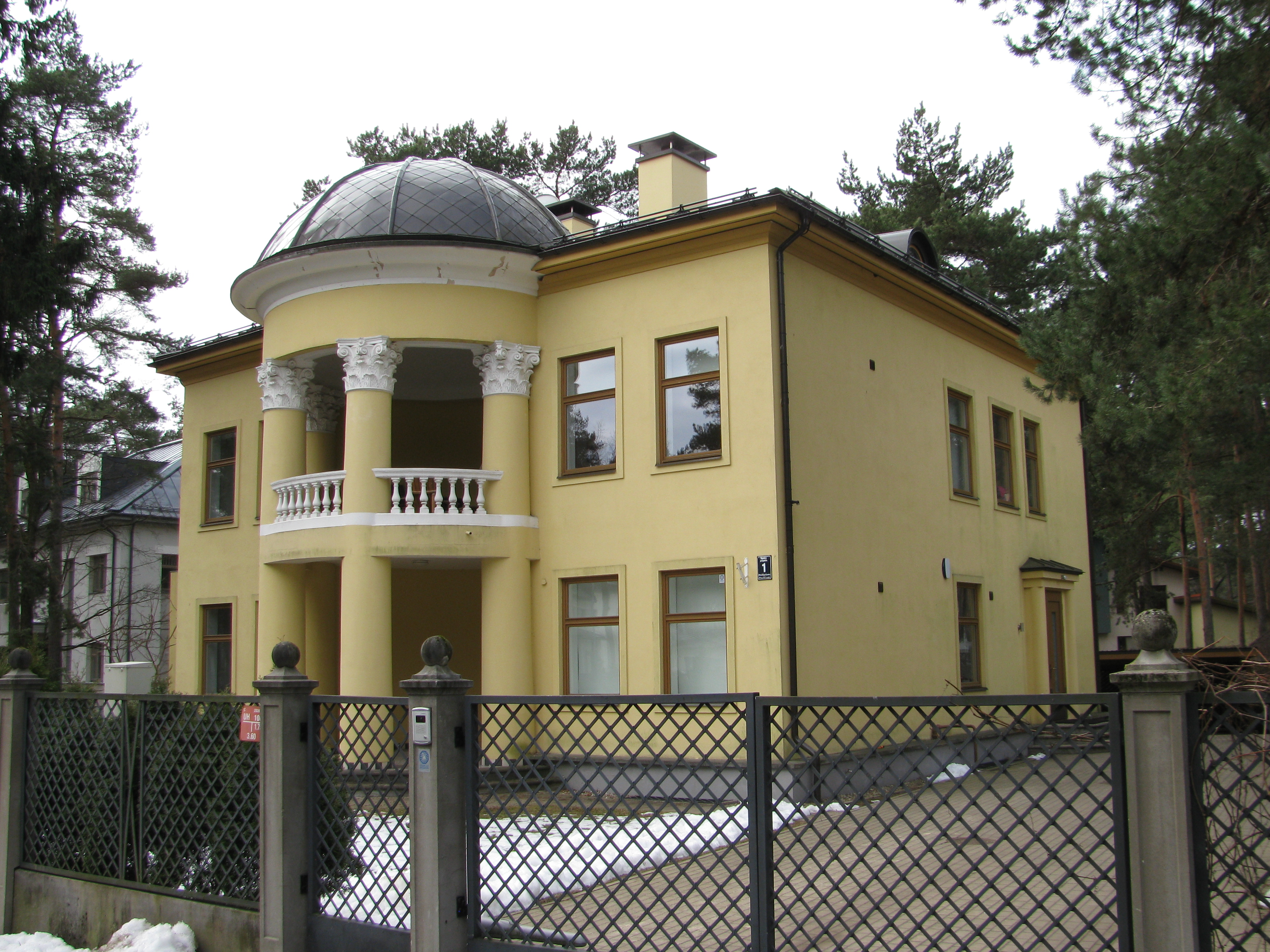 Savrupmāja, Ziemeļu rajons, Siguldas prospekts 1